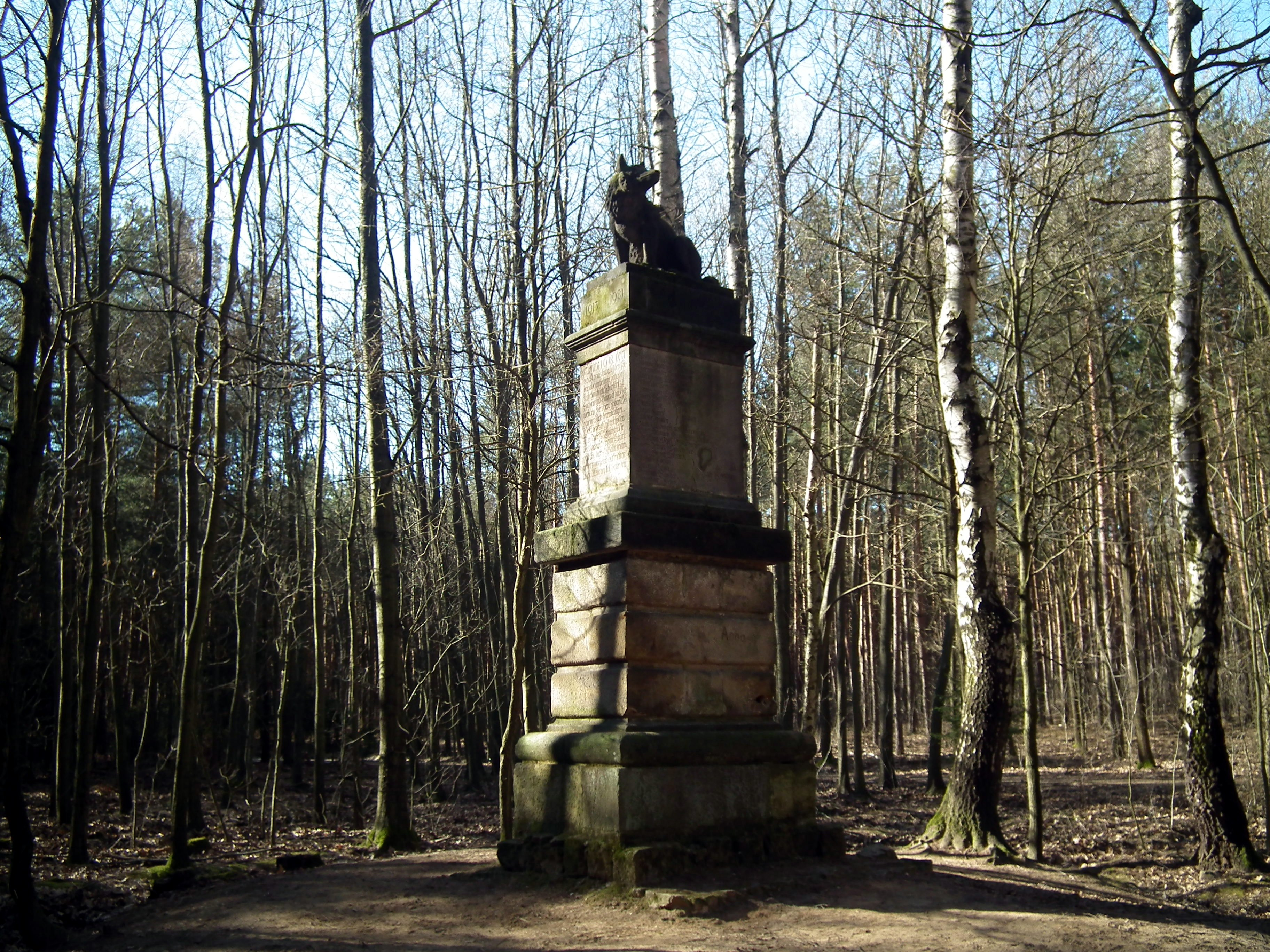 Wolfssäule Friedewald, Weinböhla, Sachsen, Deutschland